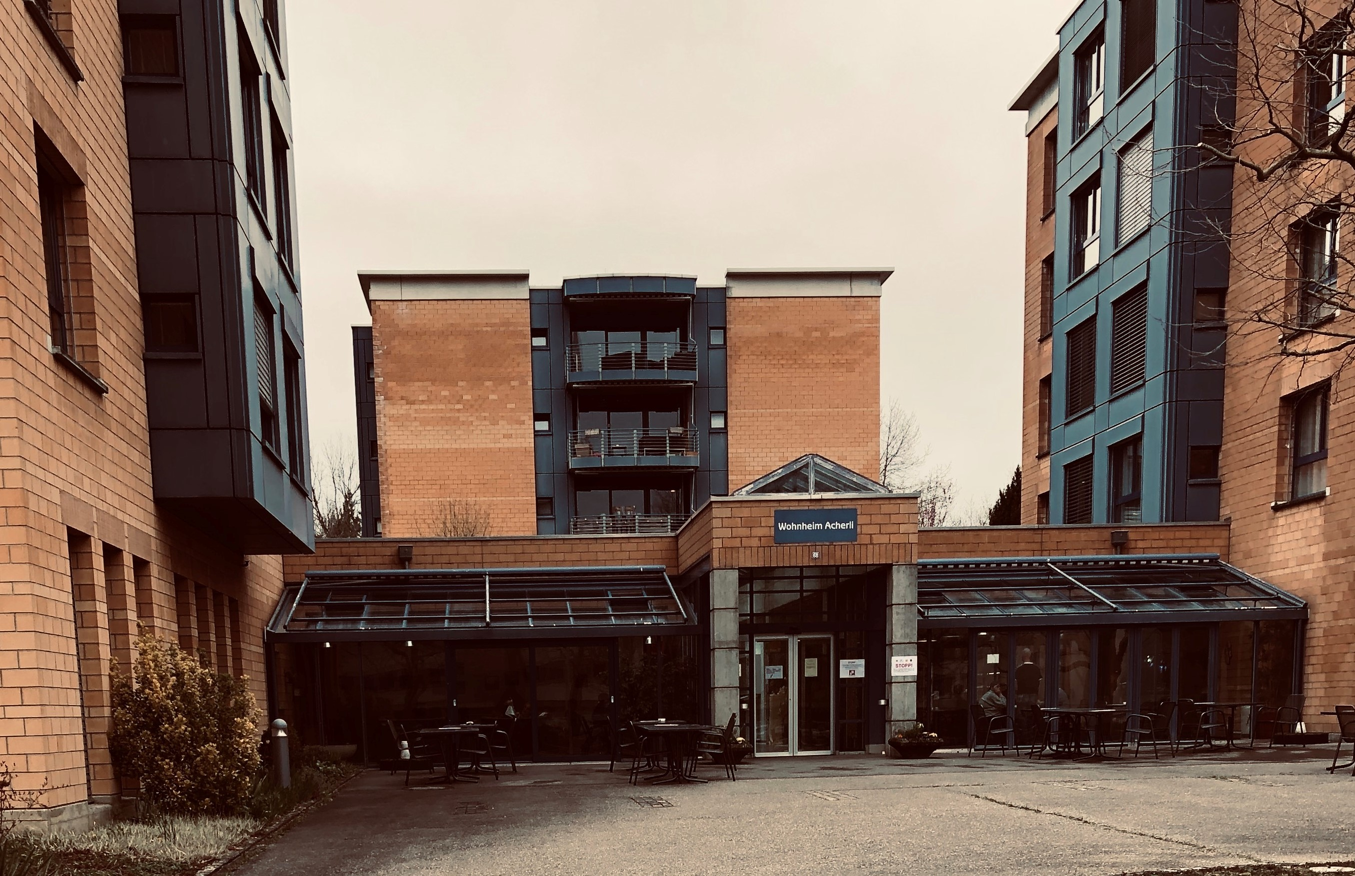 Ackerli Wochnheim Acherli Eingang